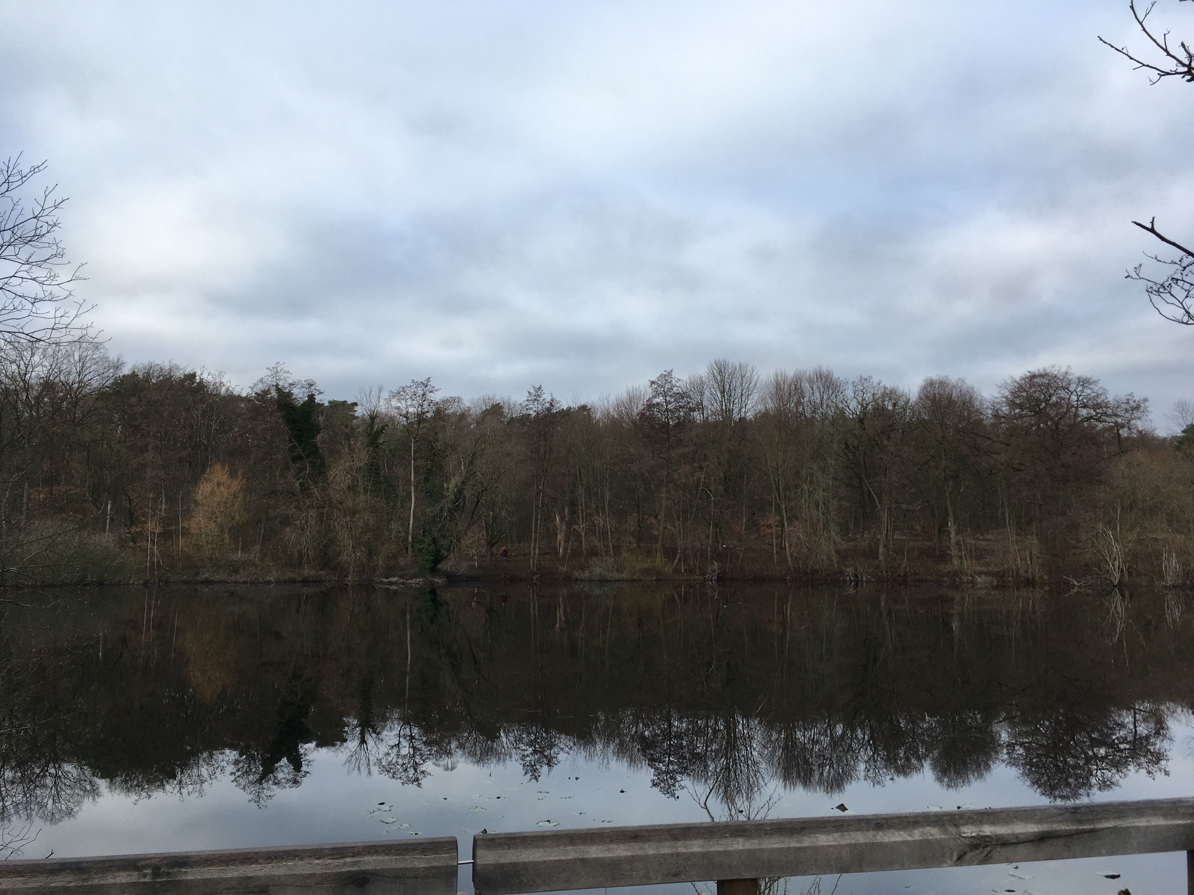 Das Teufelsseemoor Köpenick ist ein rund 6,45 Hektar großes Naturschutzgebiet in Berlin-Köpenick.